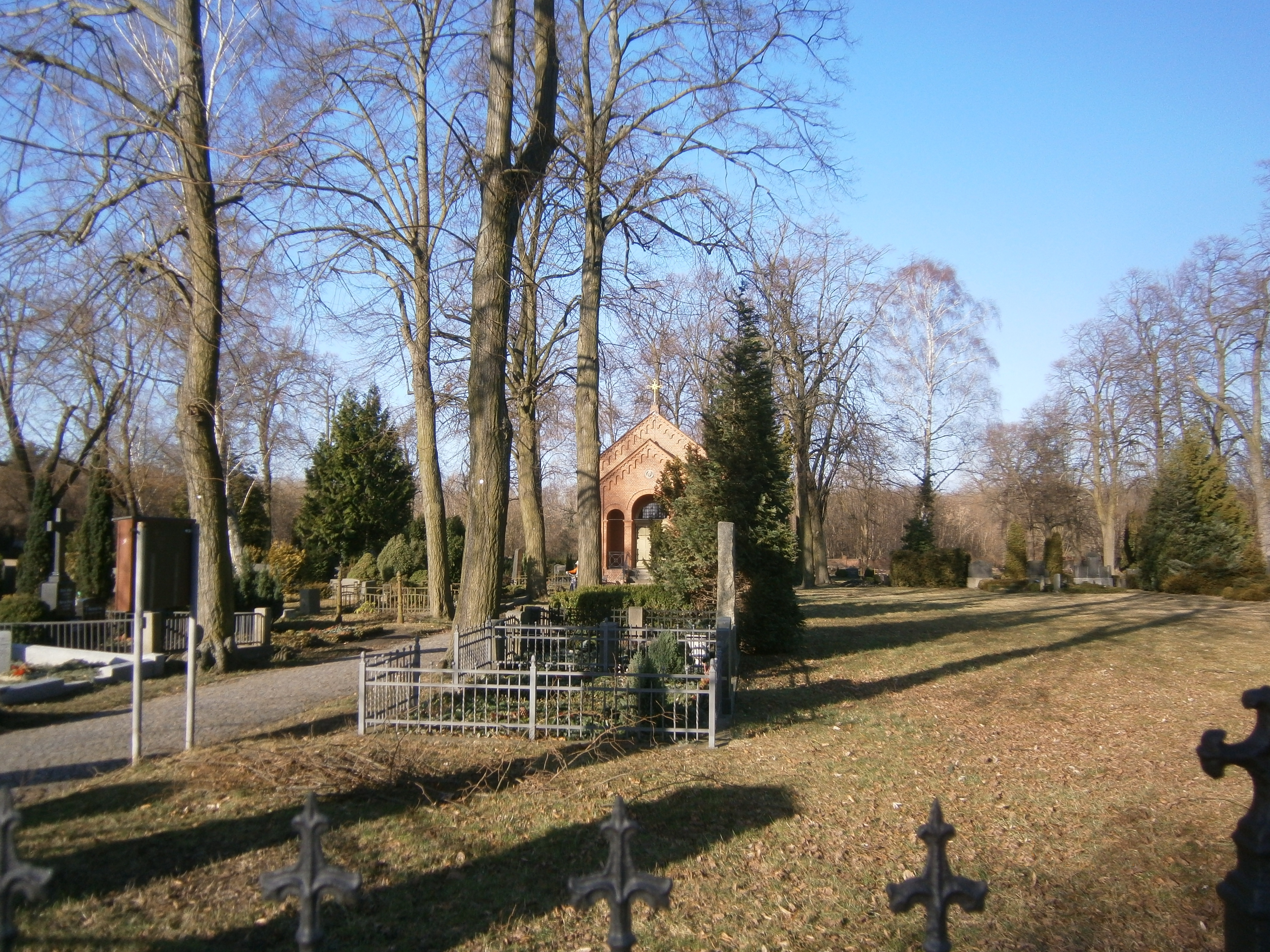 Mönchmühler Straße ist eine gewidmete, öffentliche Straße in Berlin-Rosenthal. Hier der Blick westwärts auf den ev. Friedhof Rosenthal.